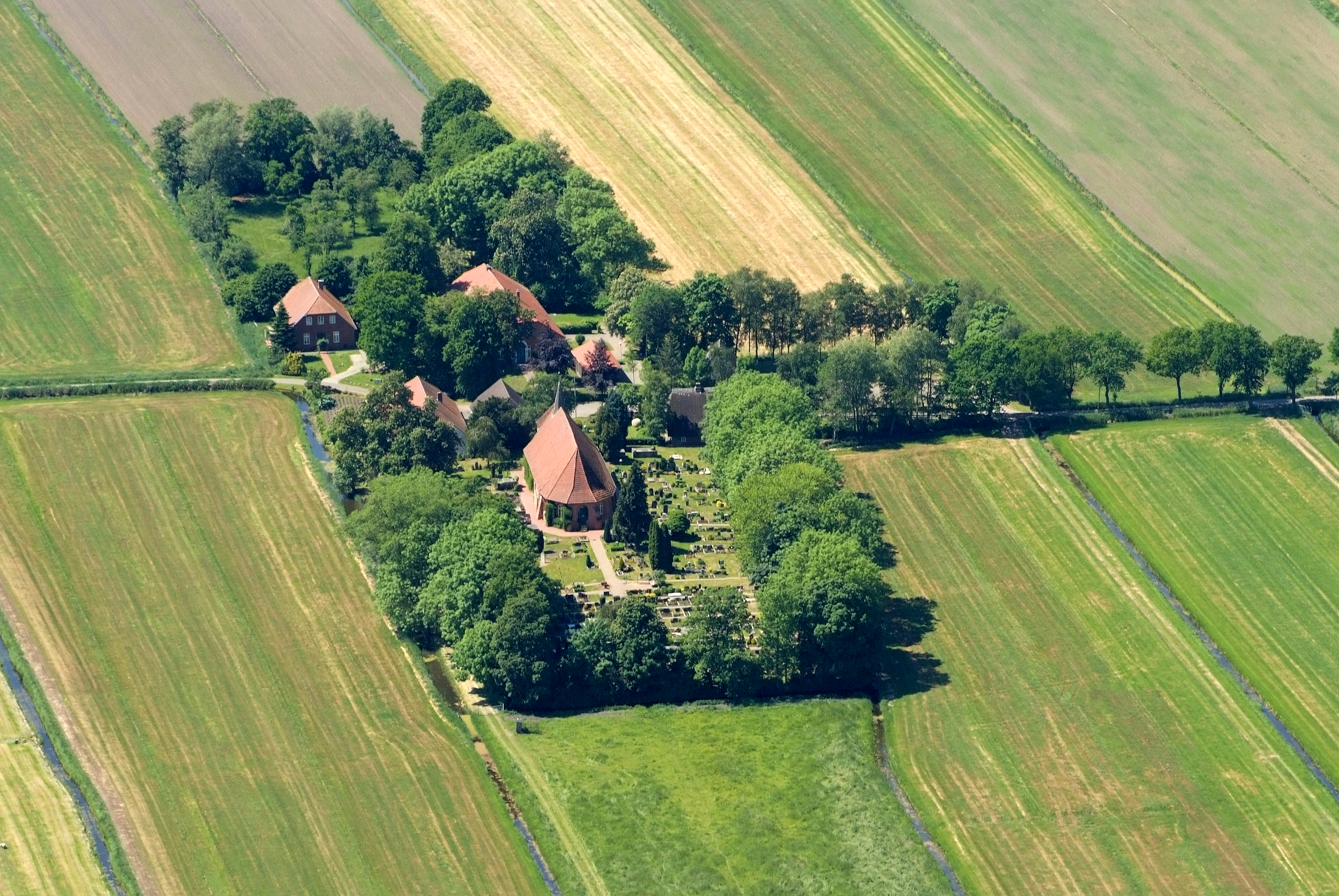 Strückhauser Kirchdorf (Ovelgönne) mit der evangelisch-lutherischen Kirche St. Johannes Fotoflug vom Flugplatz Nordholz-Spieka über Cuxhaven und Wilhelmshaven